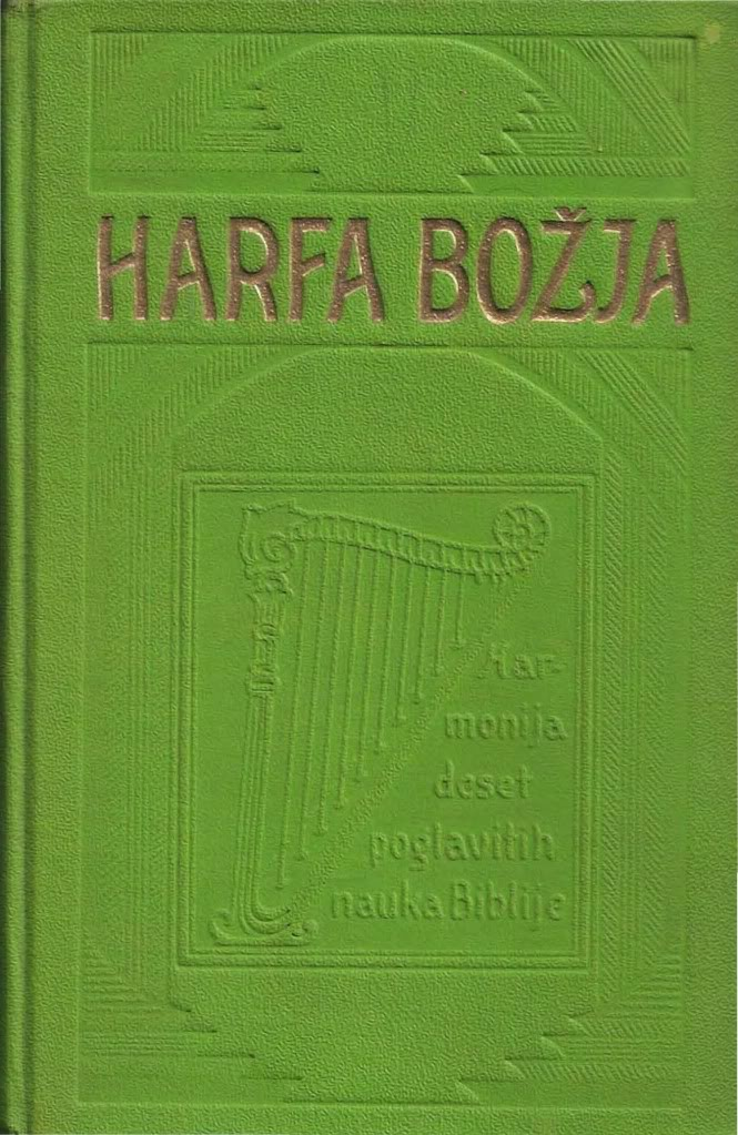 Harfa Boża, edycja chorwacka 1922